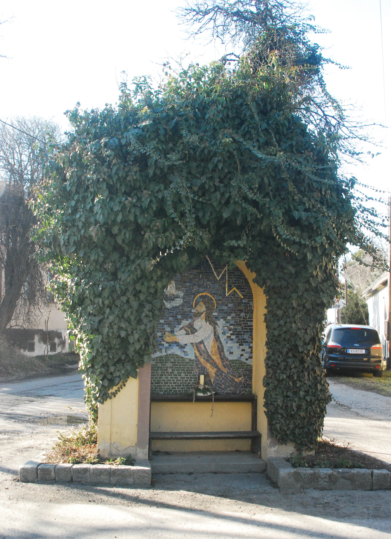 Bildstock in Unterlaa in Wien-Favoriten